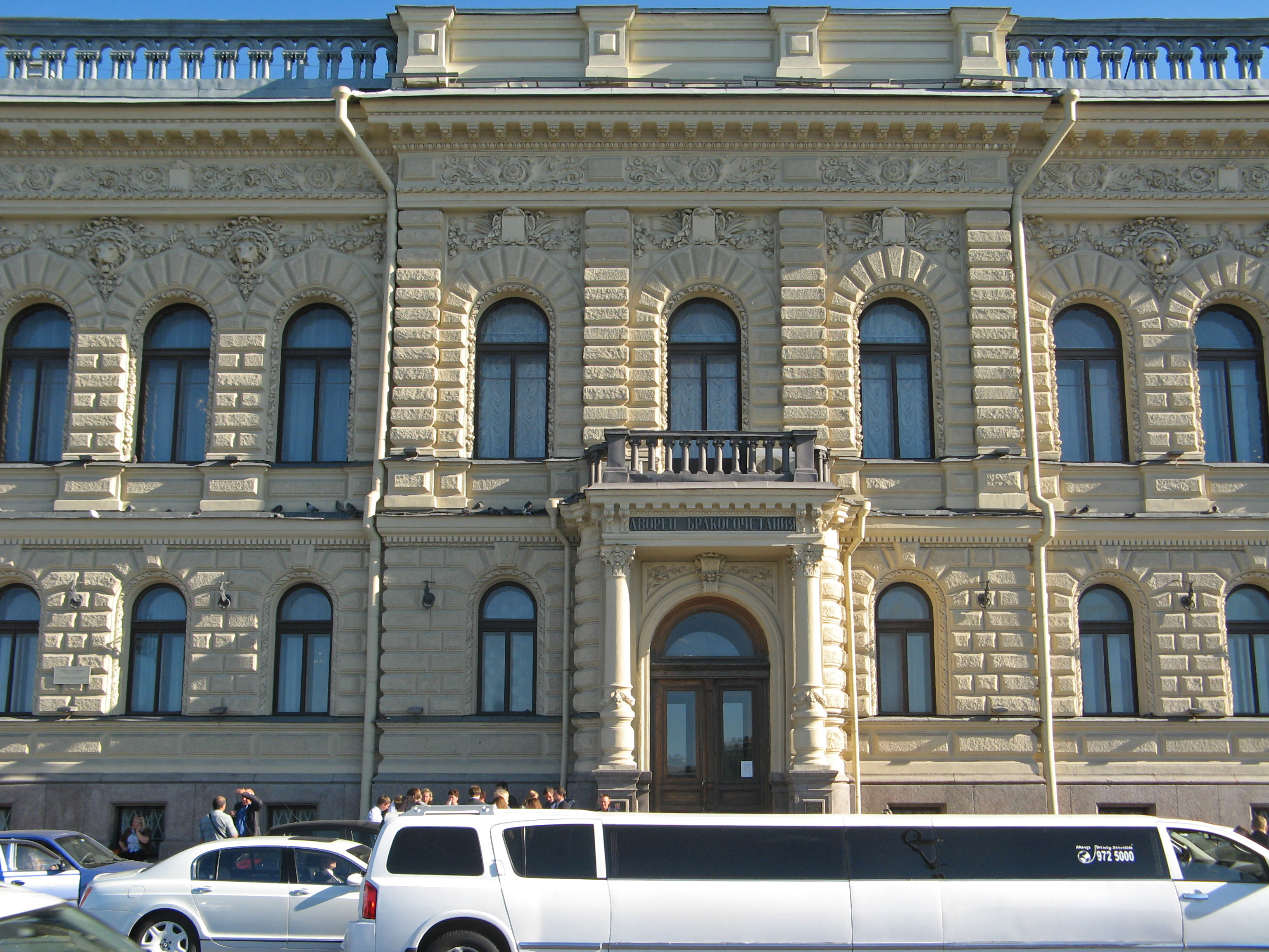 Дом П.П. Дервиза (великого князя Андрея Владимировича) с дворовыми флигелями: набережная Английская, 28 / улица Галерная, 27, Адмиралтейский район, Санкт-Петербург